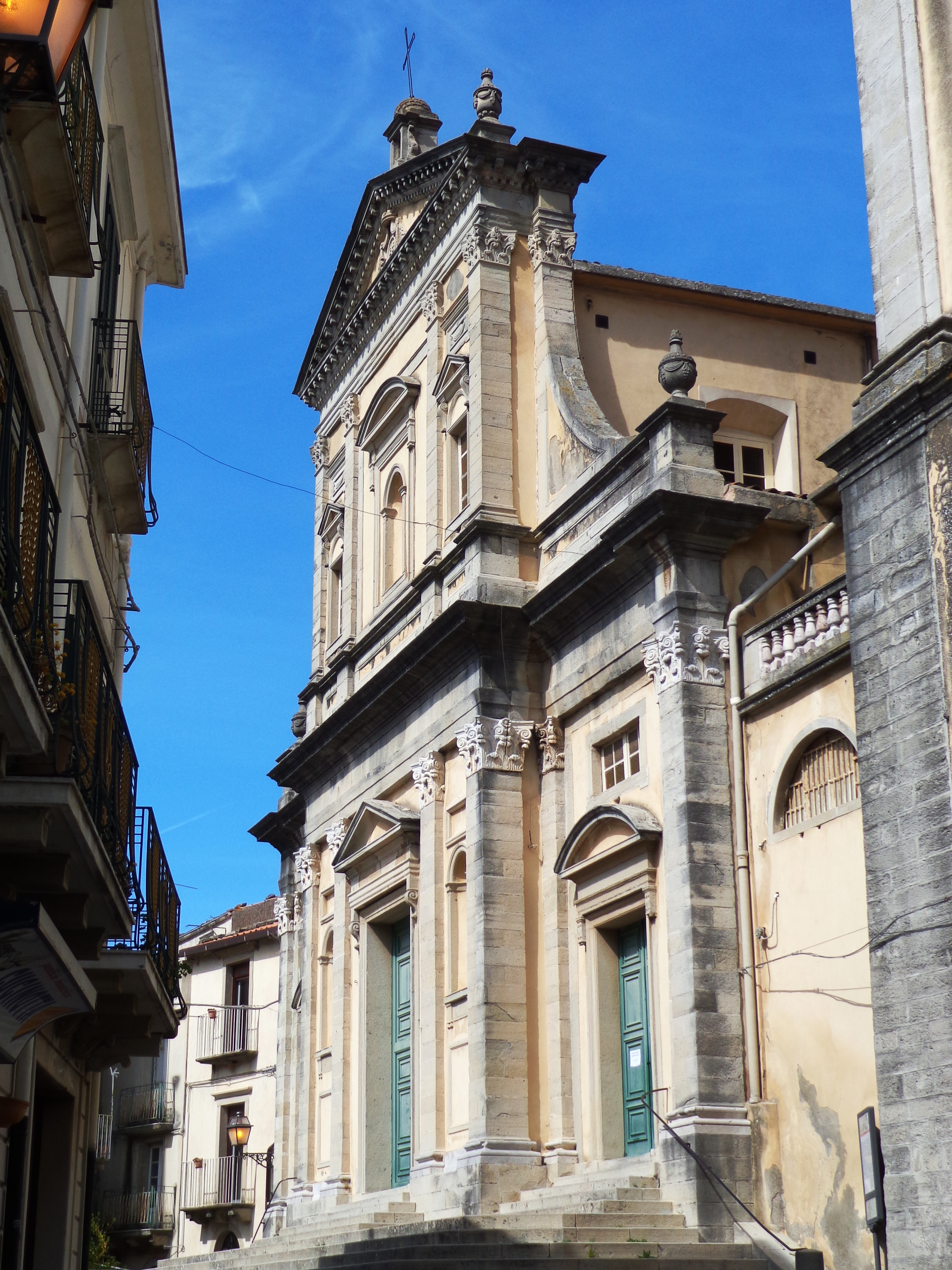 Duomo di Novara di Sicilia esterno